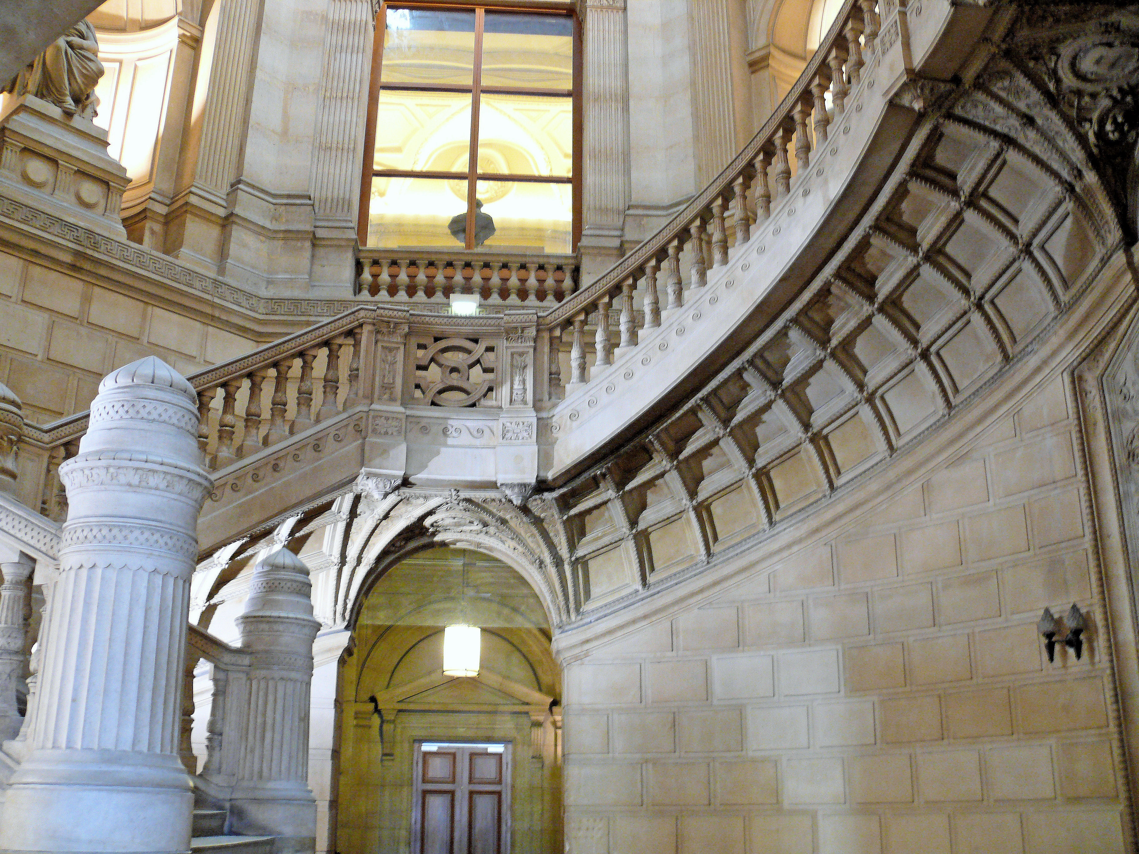 Paris - Tribunal de Commerce - Escalier